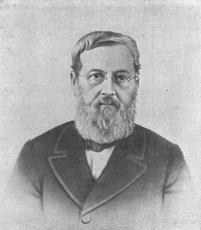 František Kún, evangelicko-reformovaný duchovní